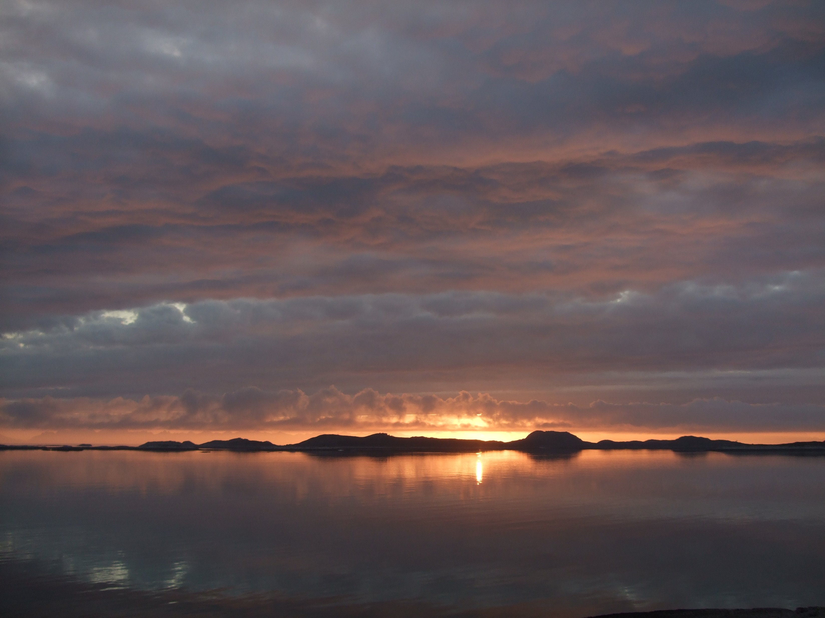 Enda et solnedgangsbilde. Tatt fra Løvøya i Steigen med utsikt over Valsværet. Lofotfjellene i bakgrunnen